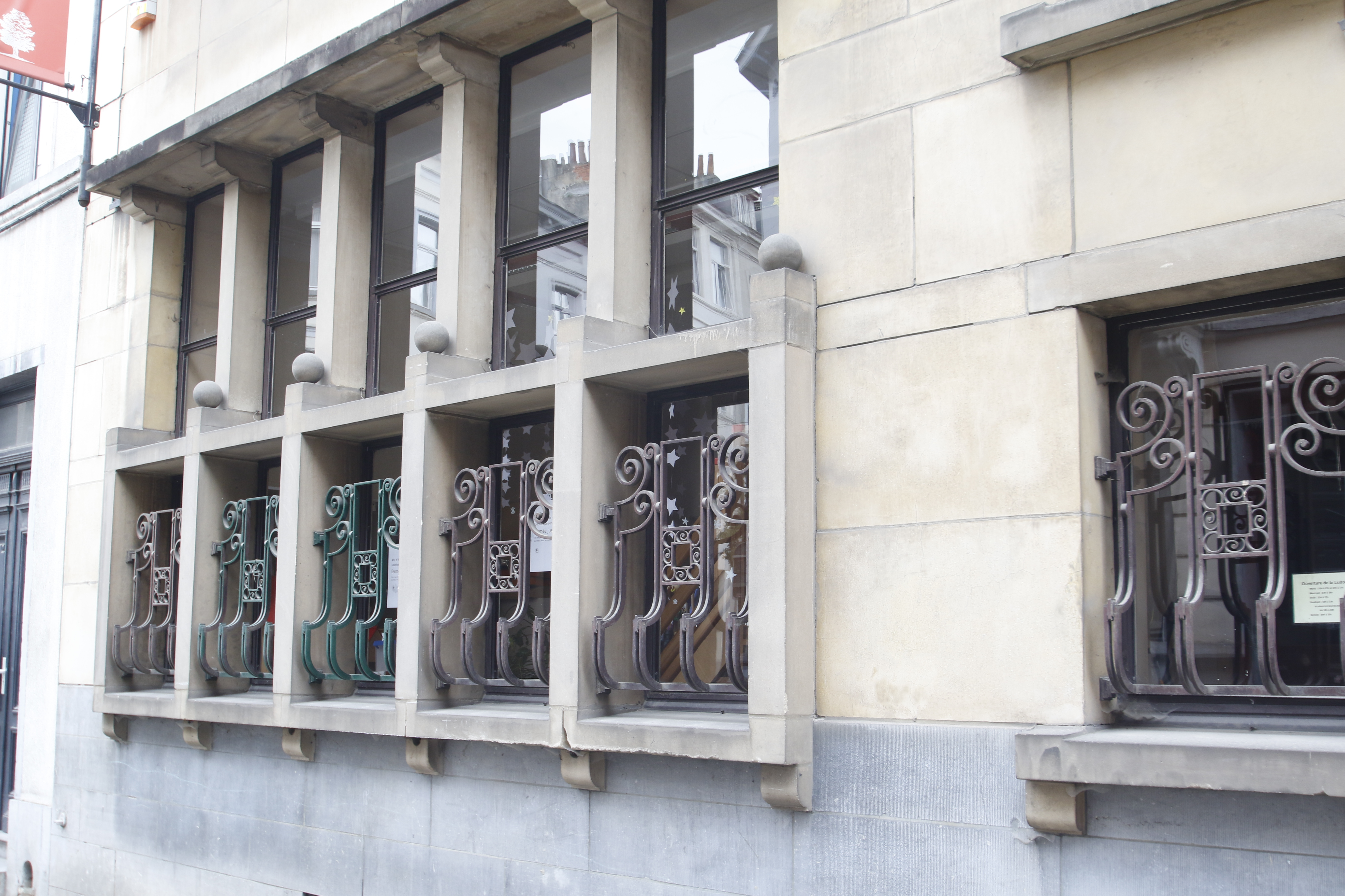 Les fenêtres du rez-de-chaussée, avec les encadrements en pierre et les grilles décoratives